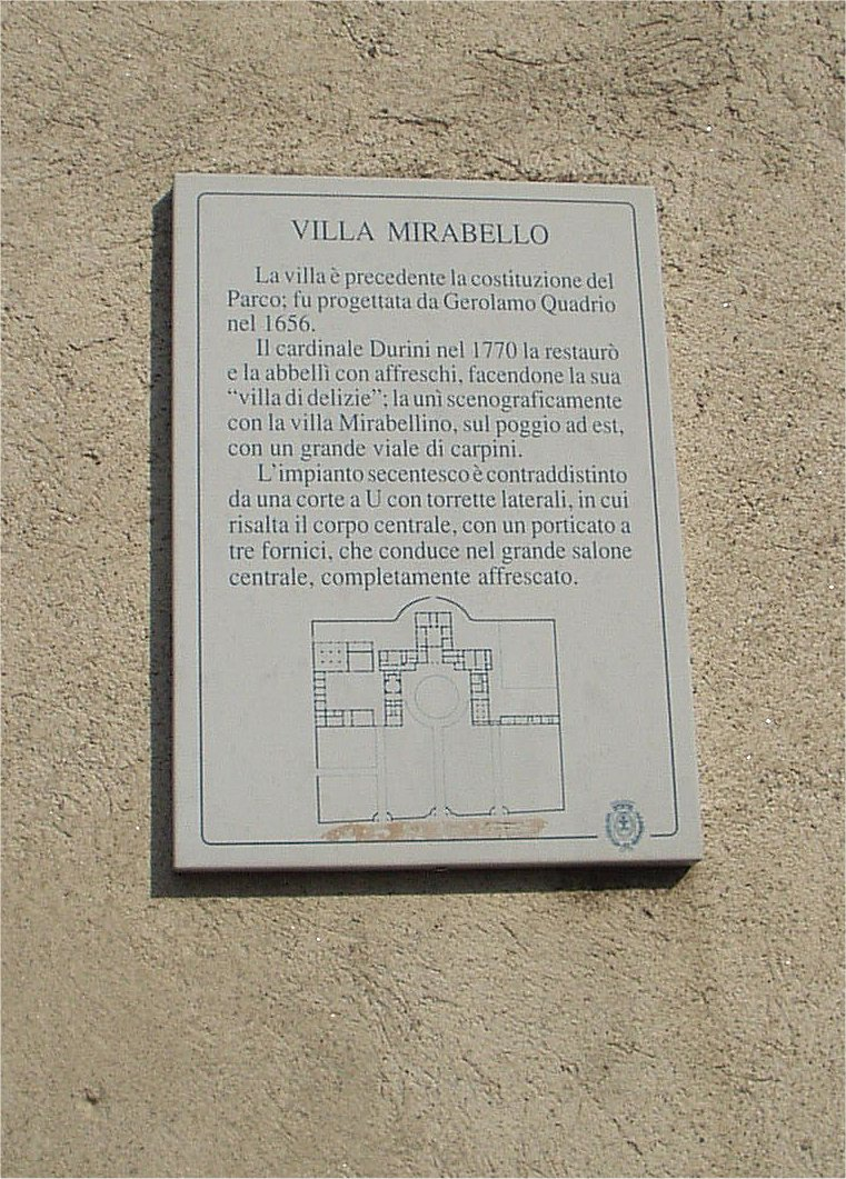 Villa Mirabello nel Parco di Monza indicazione turistica